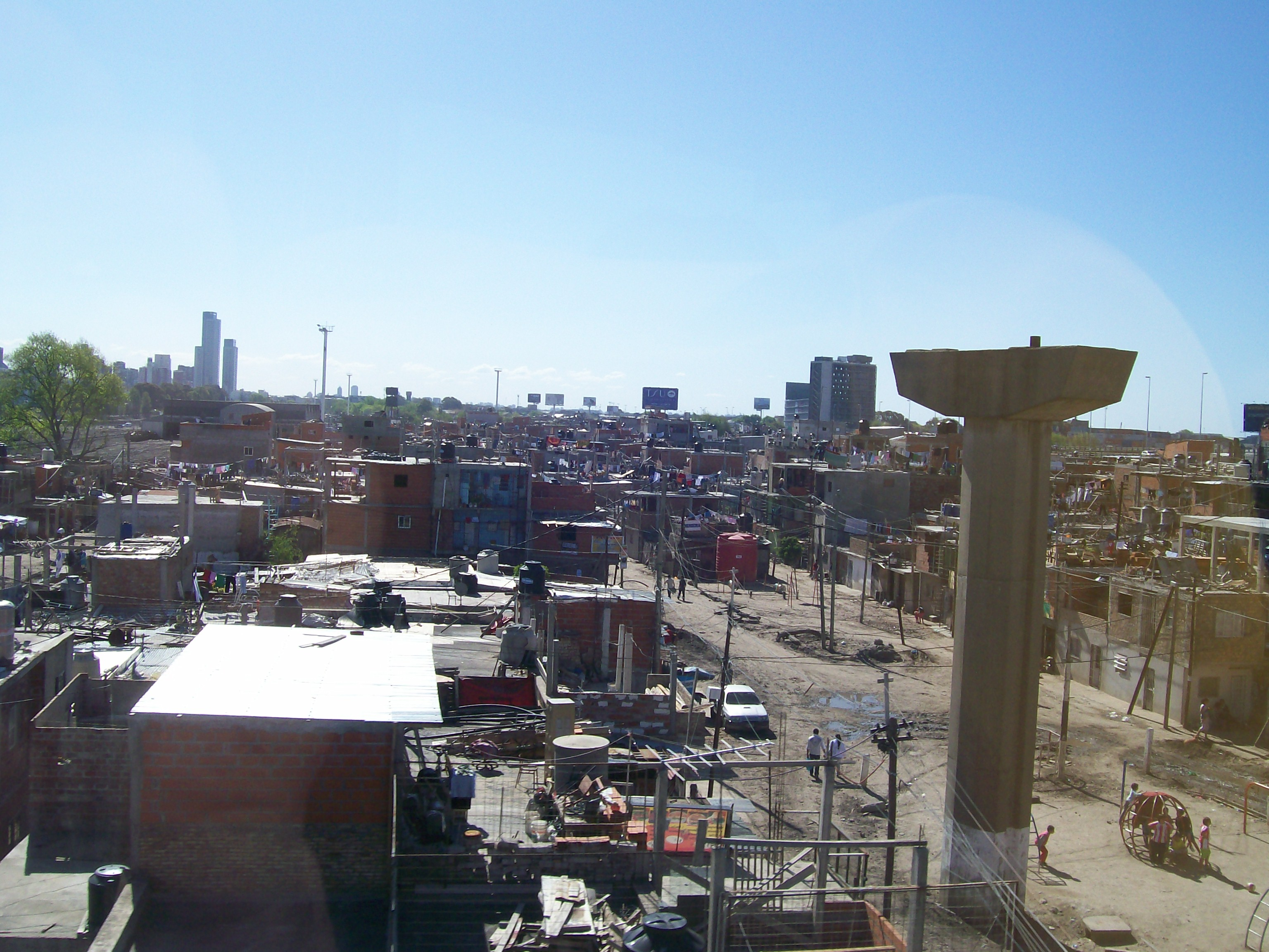 Villa Miseria en Retiro, Buenos Aires